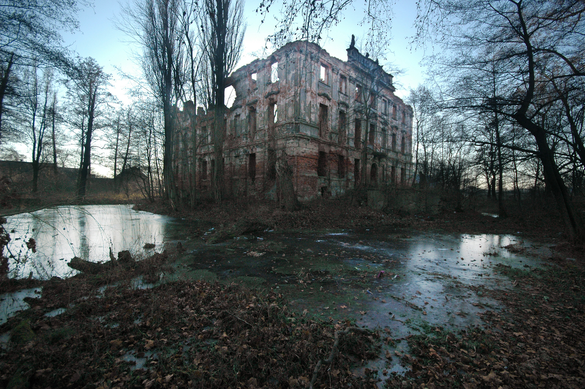 Krzydłowice - pałac (ruina) z parkiem (zabytek nr rejestr. A/2967/173/323/L z dn. 15.03.61)